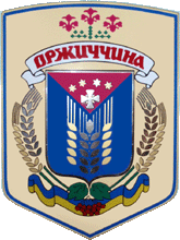 Герб Оржицького району